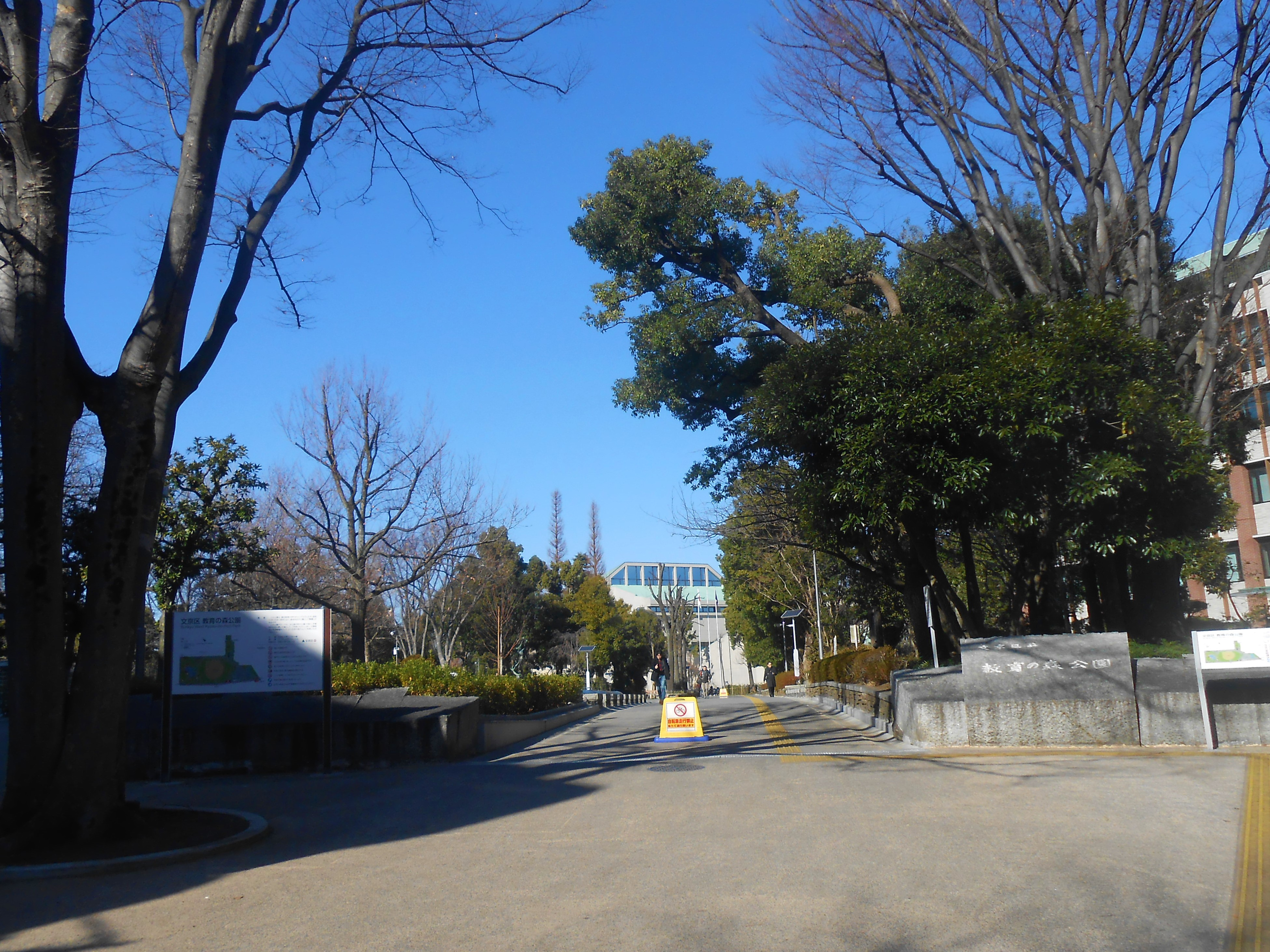 教育の森公園の正門